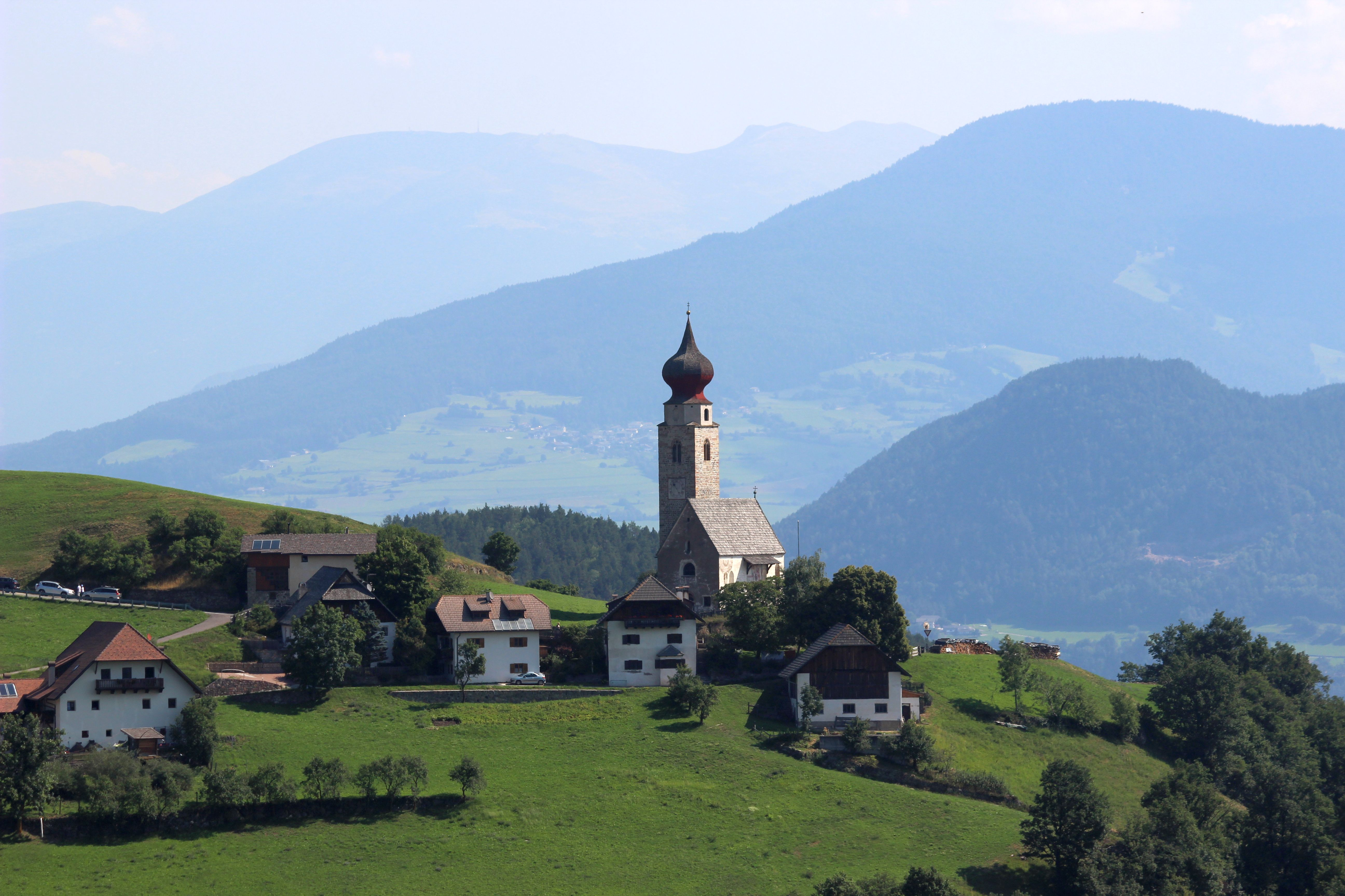 St. Nikolaus in Mittelberg am Ritten